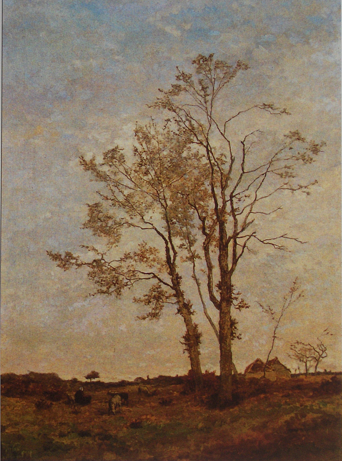 "Herfst"; olieverf op doek door Edouard Huberti (1818- 1880); 100 x 71,5 cm; privé-bezit